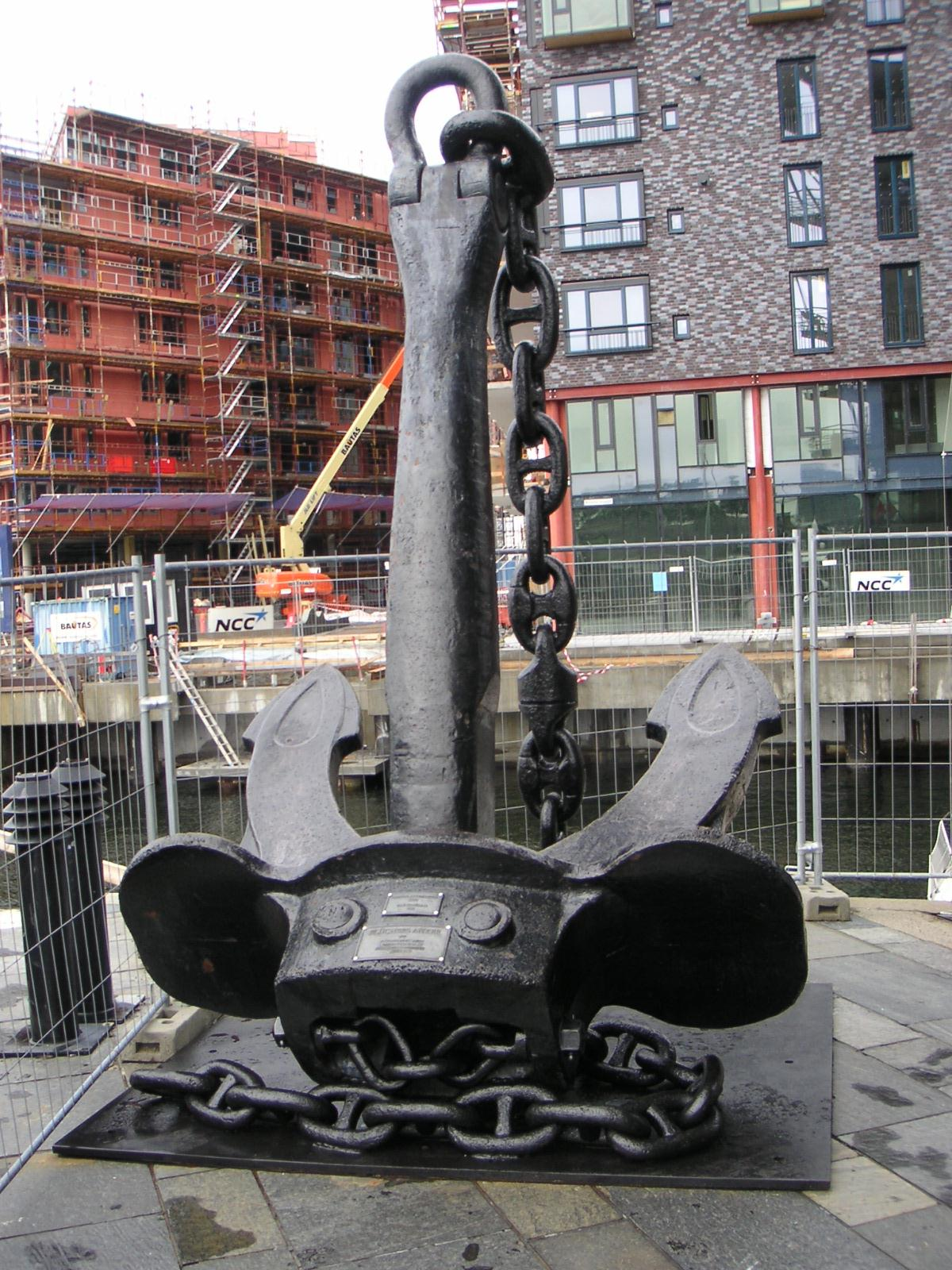 Anker der im Oslofjord gesunkenen Blücher (1934). Anker ist im Osloer Hafen aufgestelt.